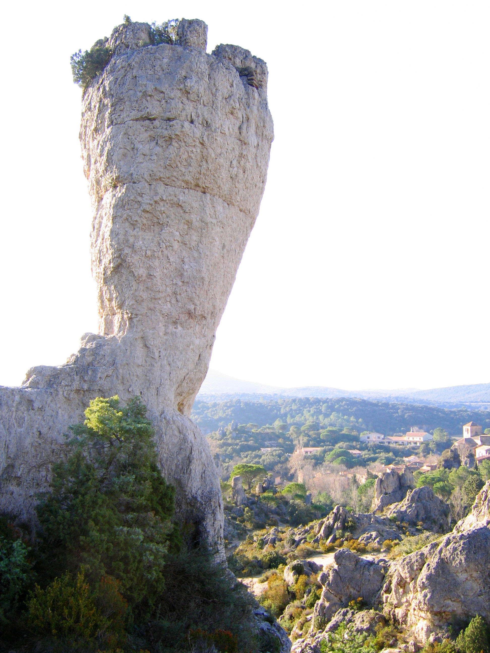 Description: Figures d'érosion dans le Cirque dolomitique de Mourèze. Hérault, France. Source: Hugo Soria Licence: GFDL Hugo Soria